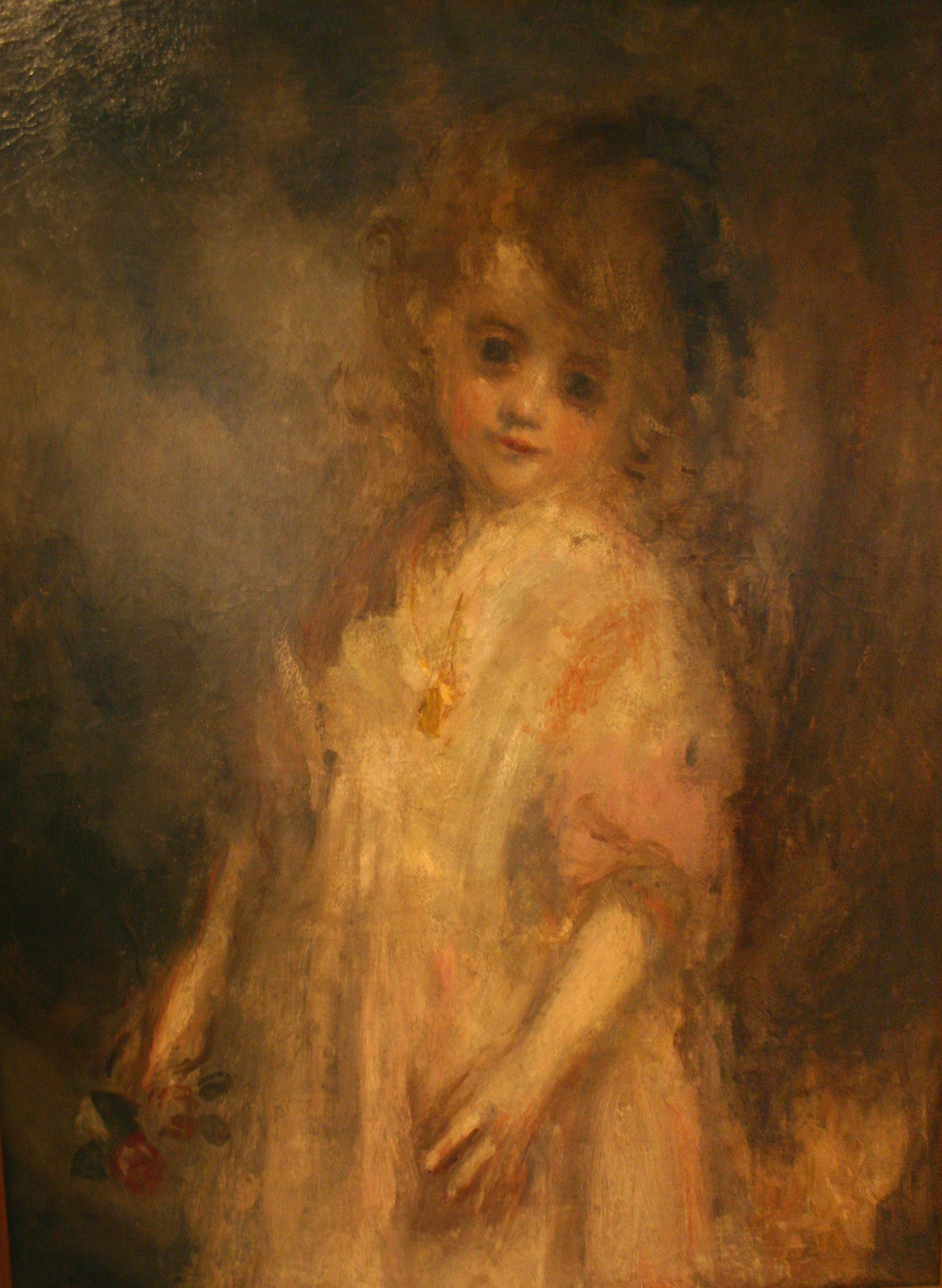 Fillette à la rose Huile sur toile Donation Cléopatre Bourdelle et Rhodia Dufet-Bourdelle, 1949 (MB p.901)